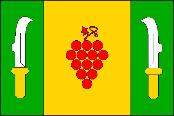 Vlajka obce Malešovice